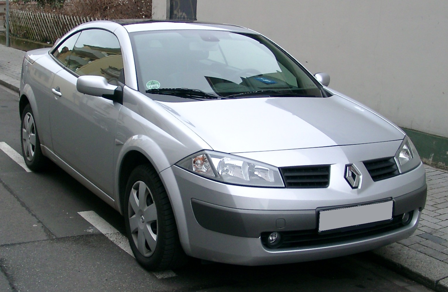 Renault Mégane CC